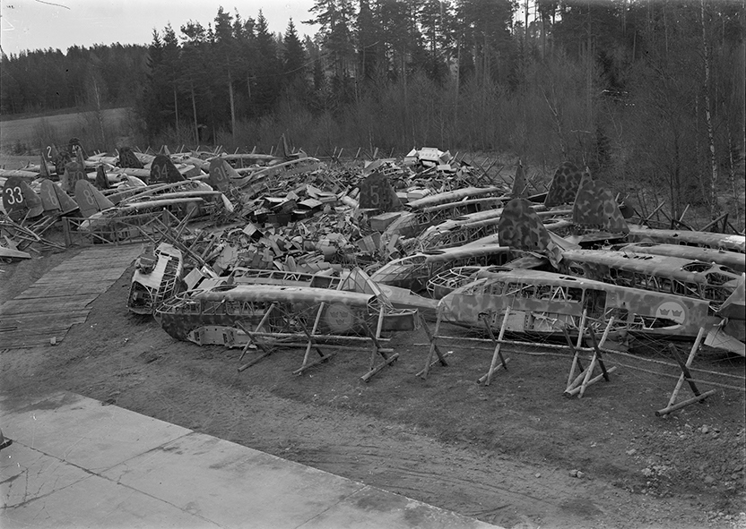 Skrotade flygplan Caproni Ca 313 - S 16 från F 11 på en skrot på Visingsö. Tillhör F 2-samlingen med nummer F 2 FM 434. Ur Flygvapenmuseums bildarkiv.